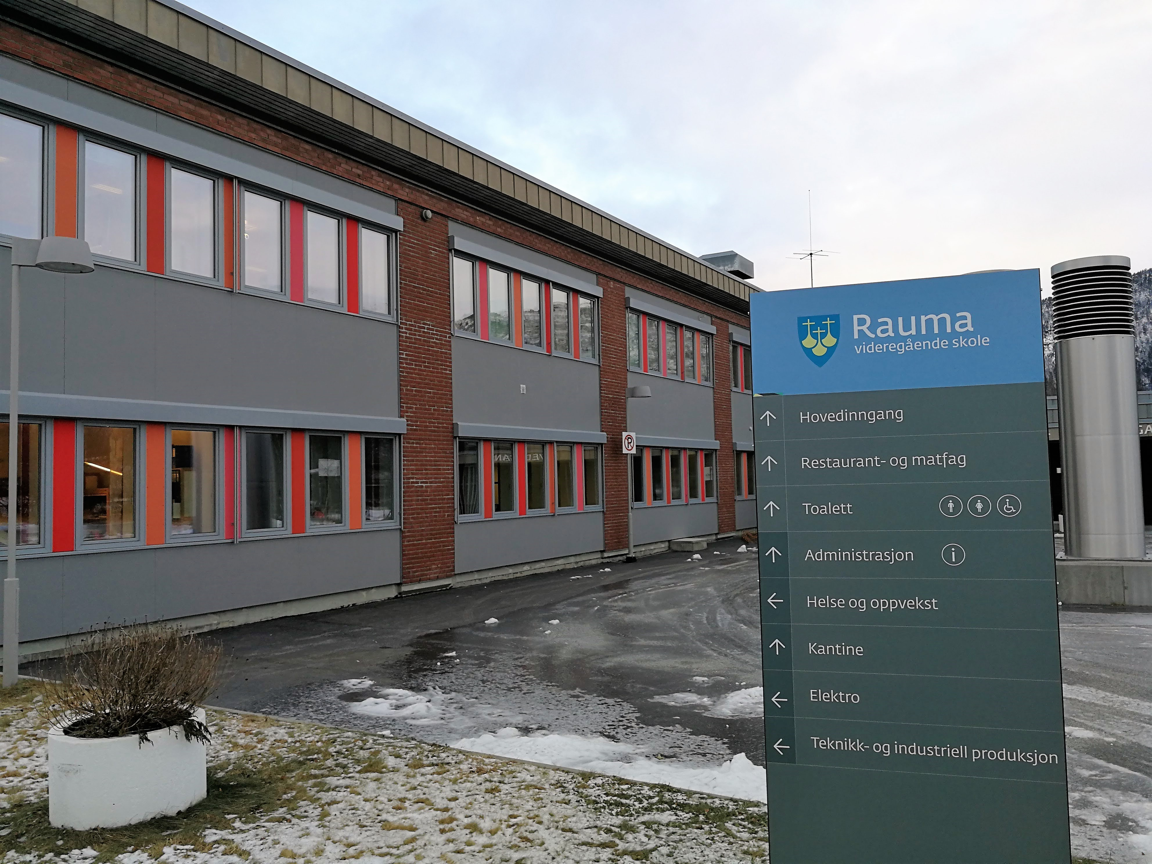 Bilde av Rauma vgs